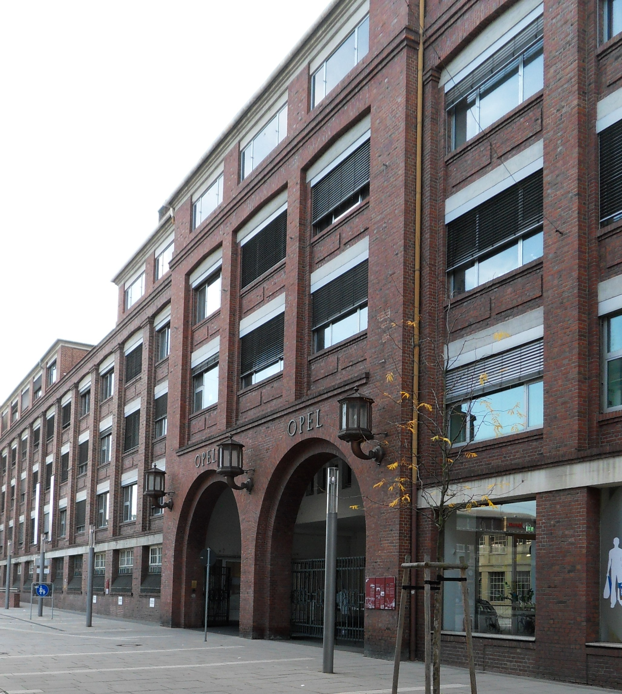 Opel-Hauptportal in der Marktstraße von Rüsselsheim am Main; in der Nähe des Bahnhofs. Das Portalgebäude wurde in mehreren Bauabschnitten von 1912 bis 1921 nach Plänen des Architekten Prof. Paul Meißner errichtet